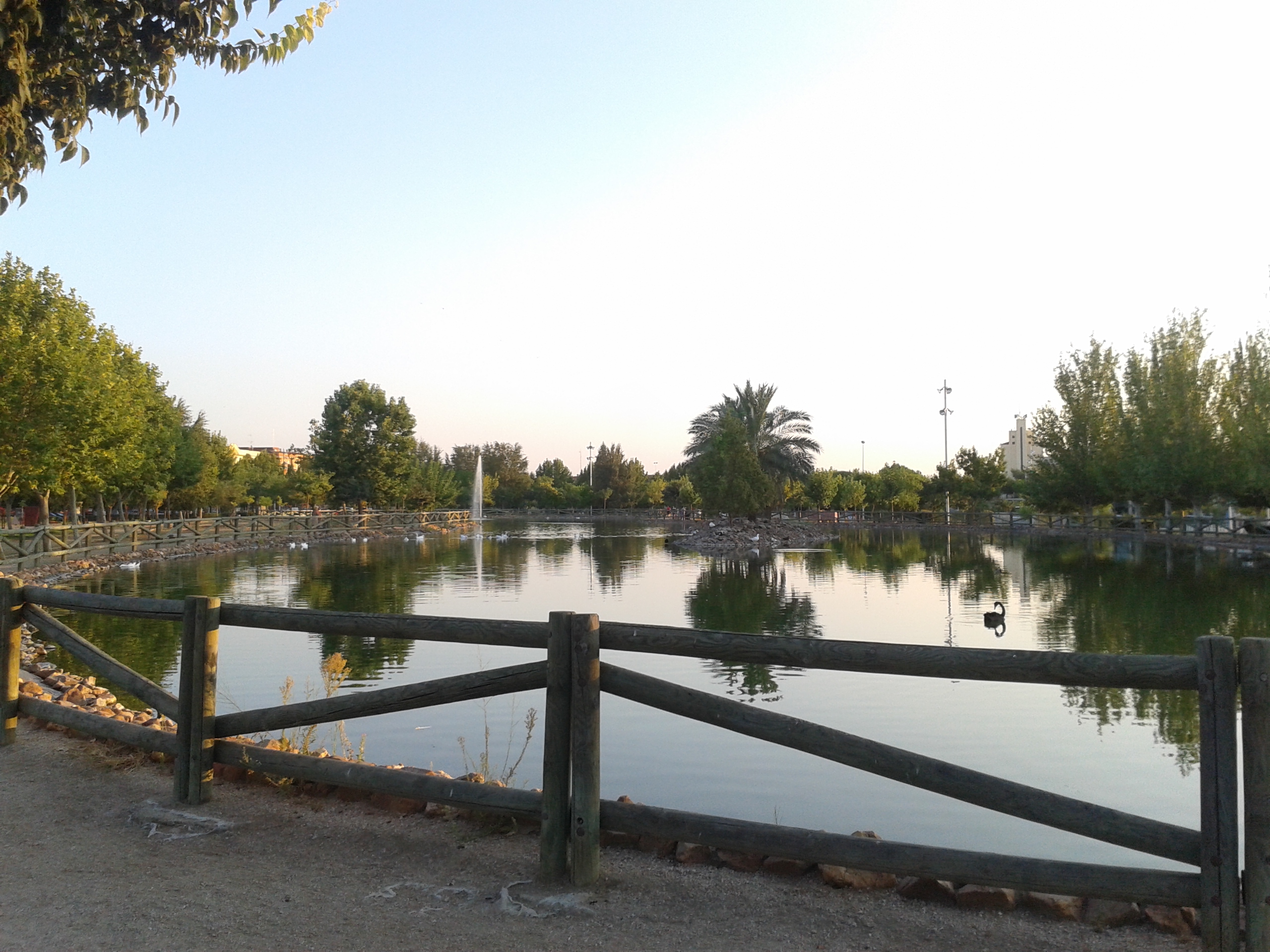 Parque Municipal de las Albercas en Don Benito.